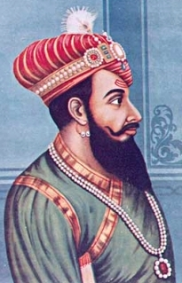 yakoji of Tanjore